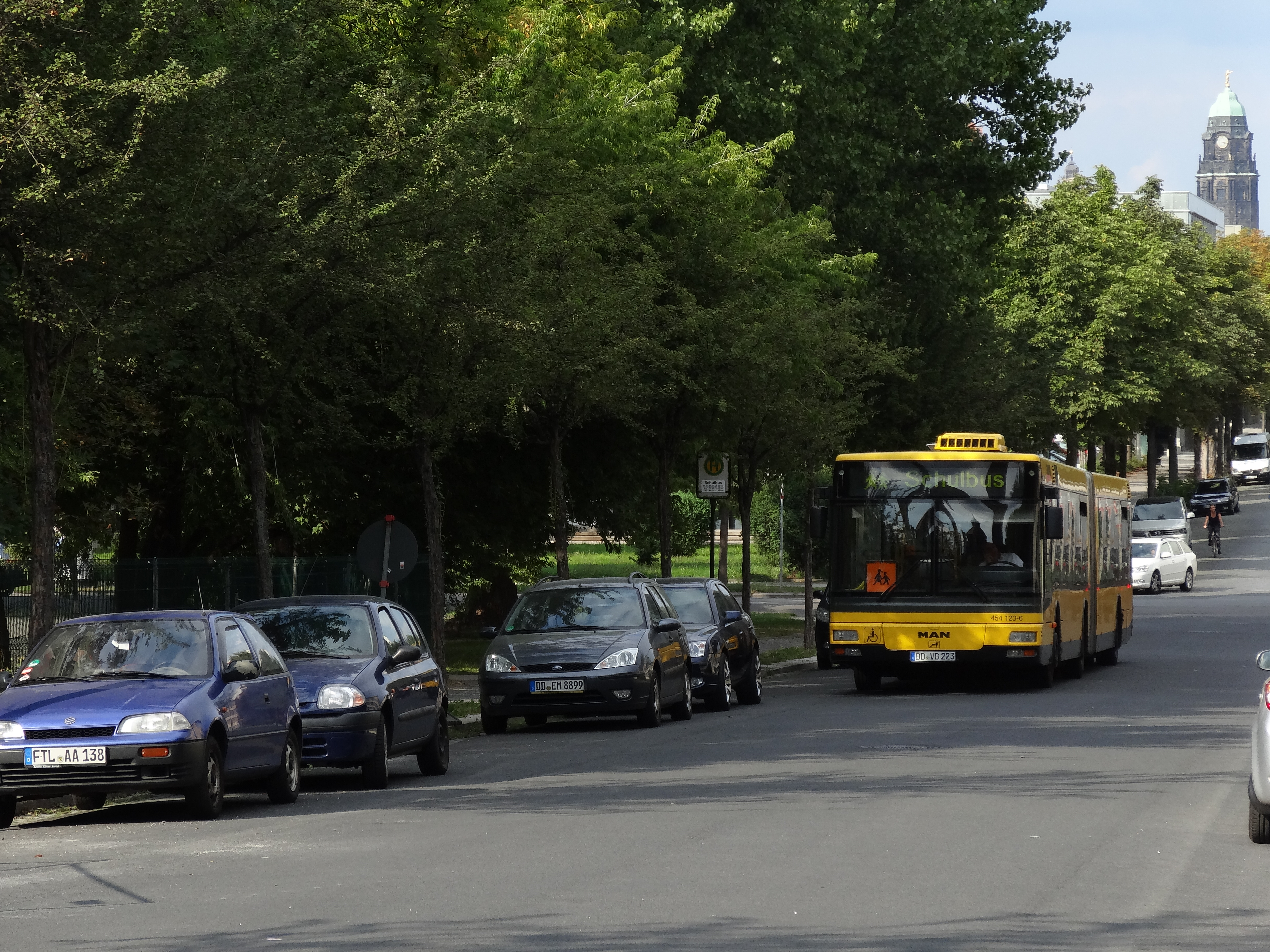 Andreas-Schubert-Straße, Dresden, Germany